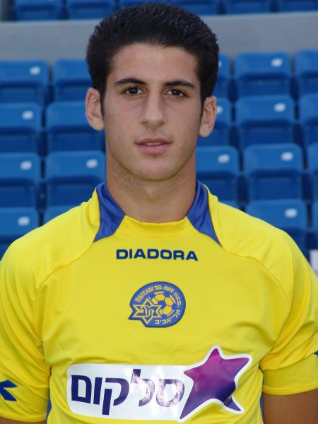 דודו ביטון, שחקן מכבי תל אביב (Dudu Biton of Maccabi Tel Aviv)